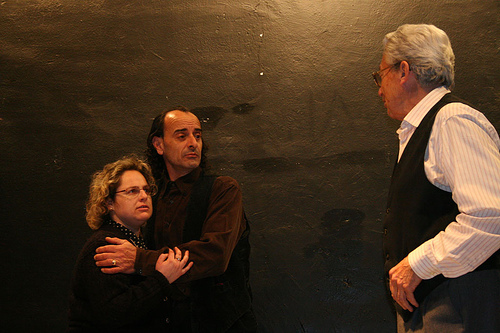 Perquè aquí jo sóc l'amo com abans. De tu, i de tot, i d'ella! D'ella. Fly to this location.